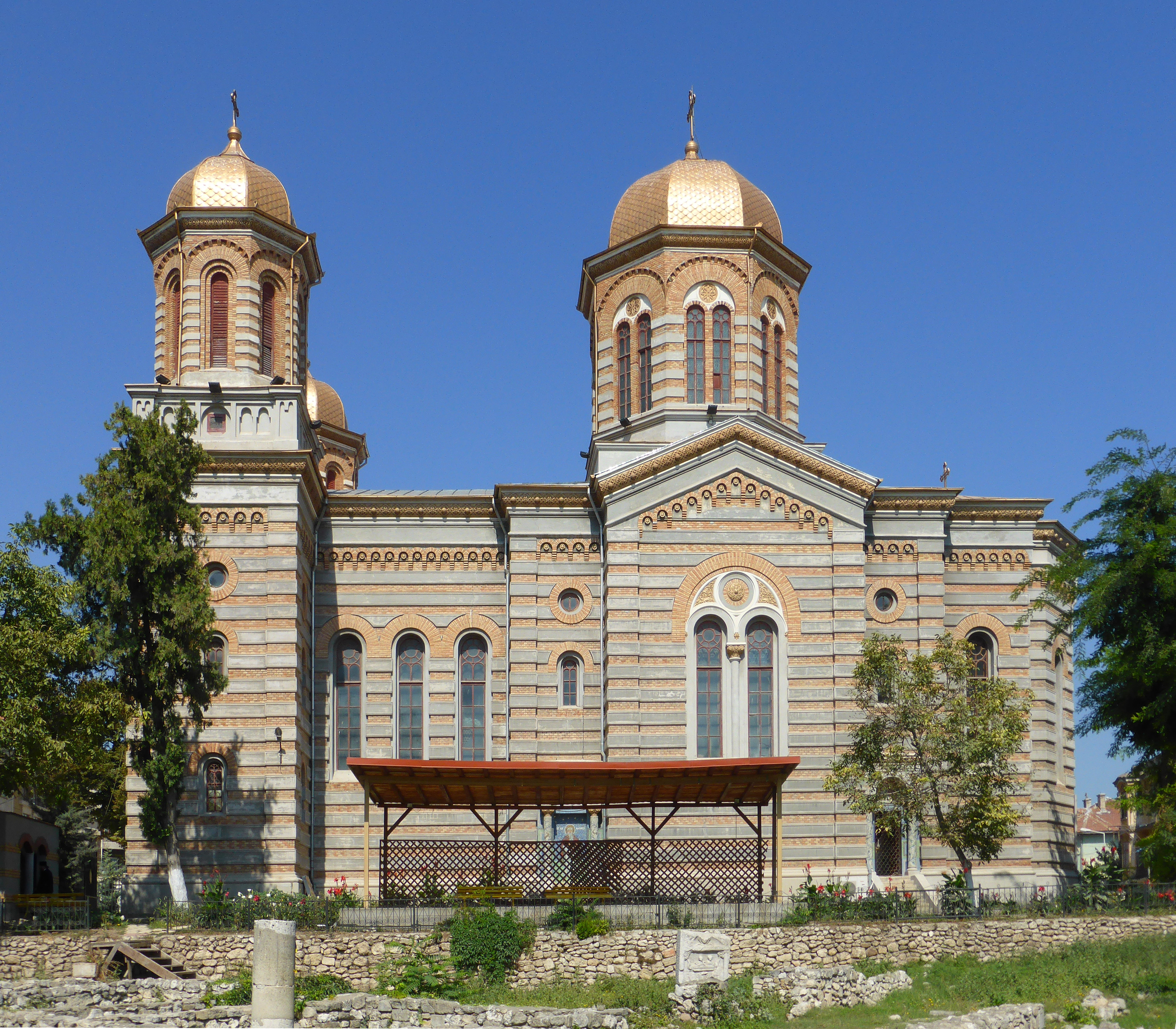 Orthodoxe Kathedrale Peter und Paul in Konstanza